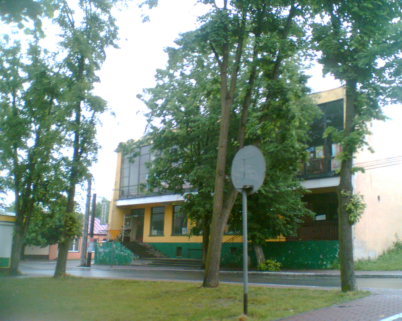 Pawilon w centrum Radoszyc